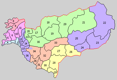 和歌山県日高郡の町村制時点の町村。